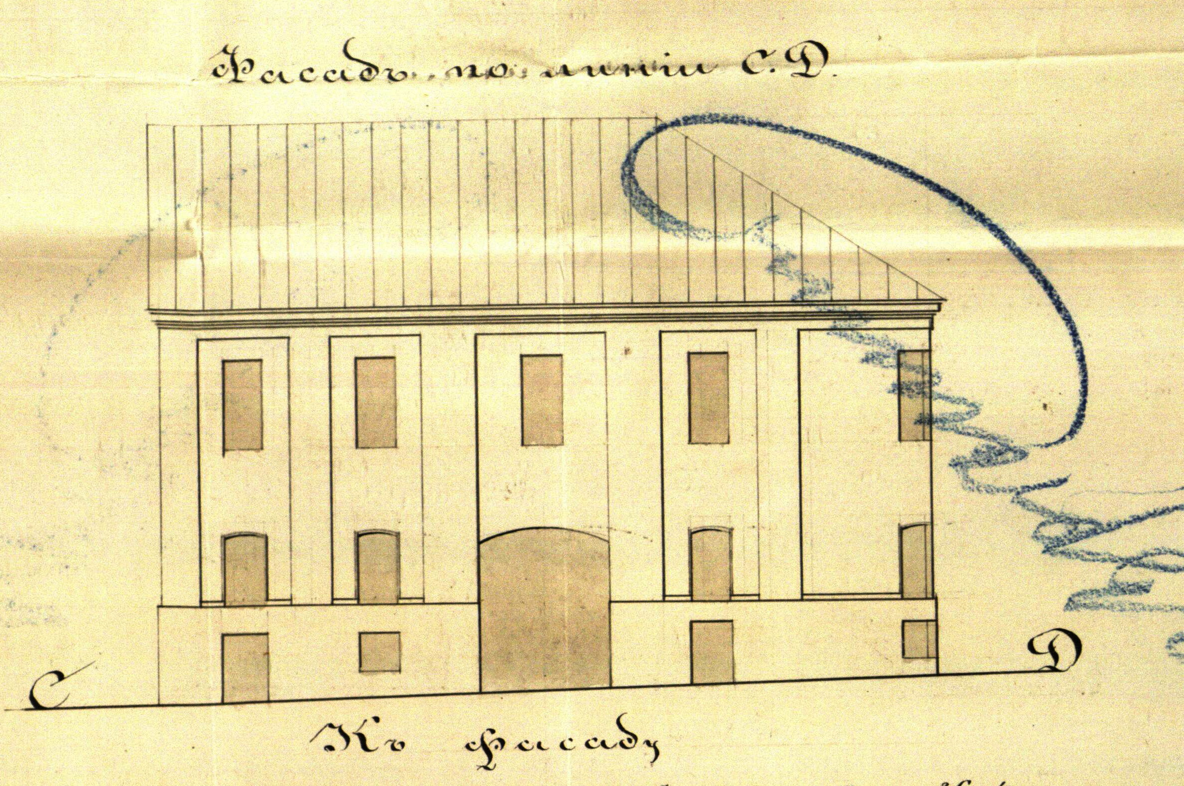 Беларуская (тарашкевіца): Менск (Miensk), рог завулку Музычнага (zavułak Muzyčny) і вуліцы Малой Бэрнардынскай (vulica Małaja Bernardynskaja)